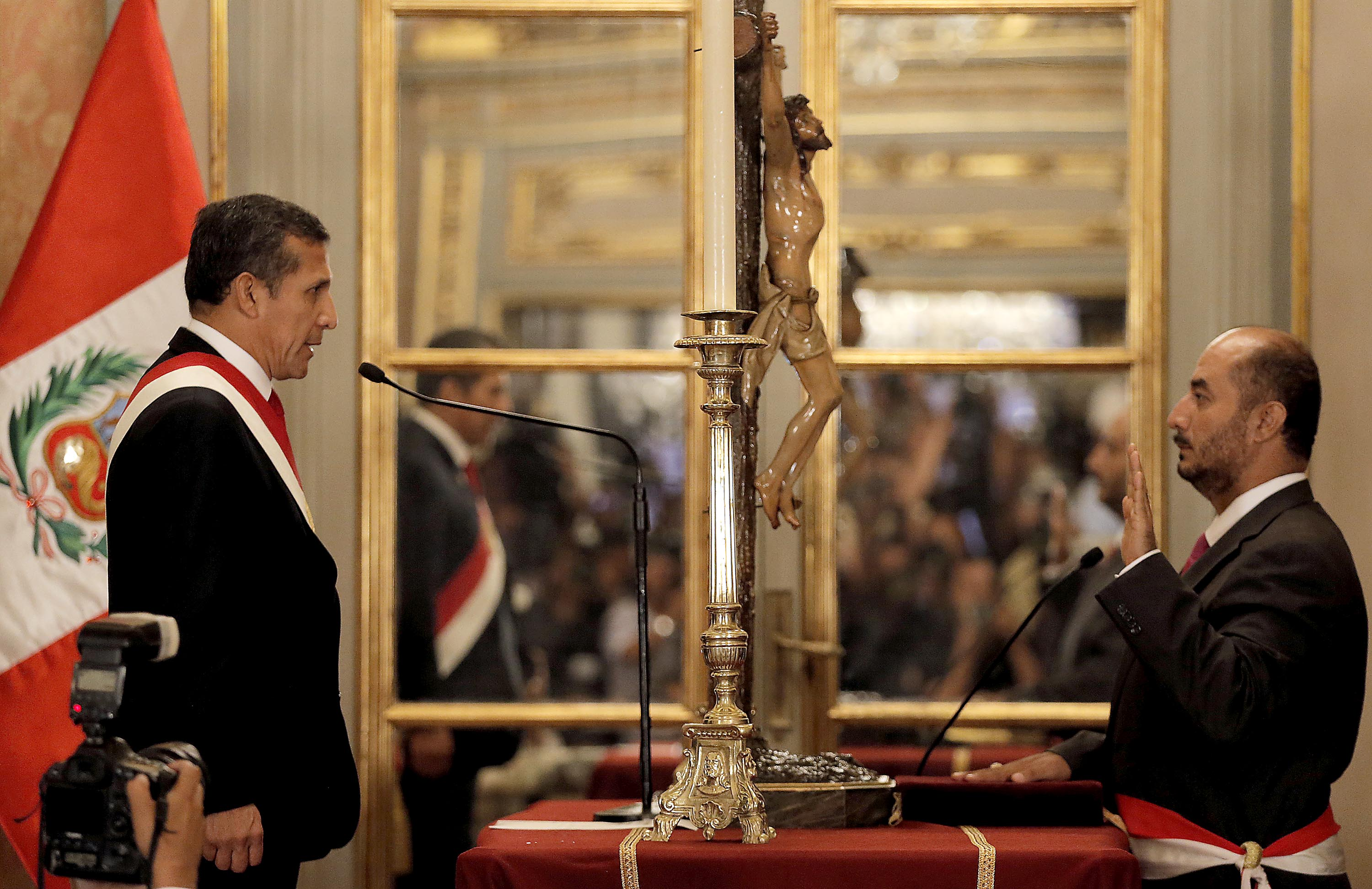 José Luis Pérez Guadalupe, Ministro del Interior de Perú, en la ceremonia de juramentación del Gabinete Cateriano, el 2 de abril de 2015.